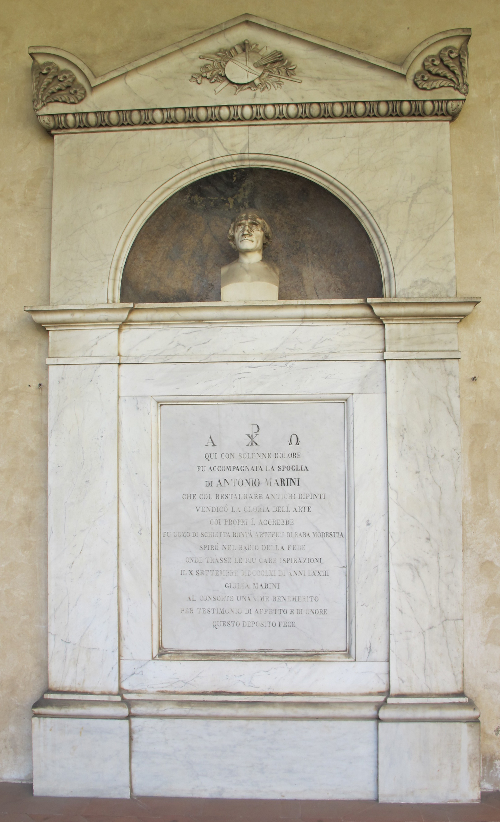 Chiostro di s. domenico, po, tomba antonio marini